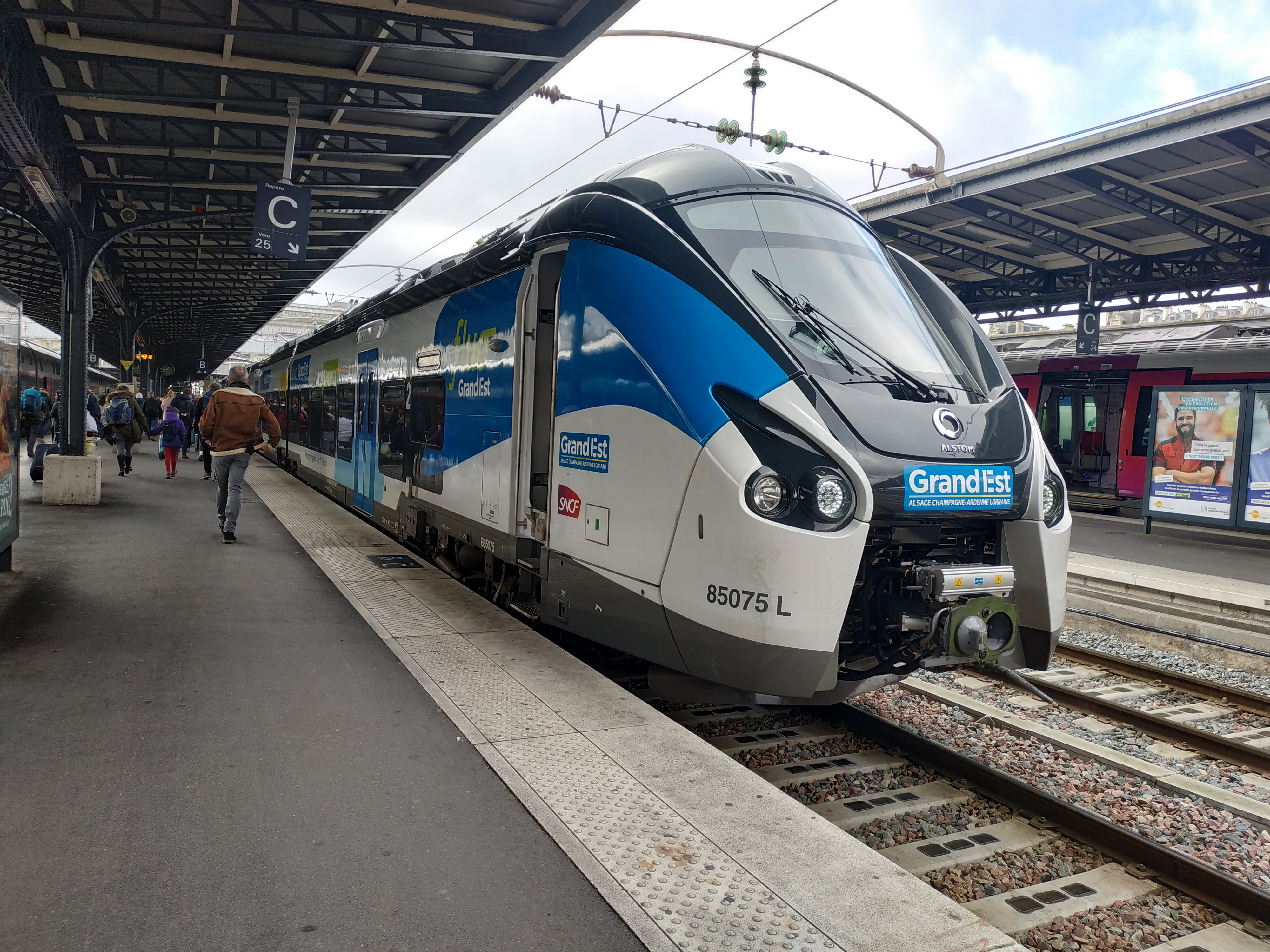 Alstom Regiolis - Coradia Liner Intercités B85075 du TER Grand Est en livrée Fluo Grand Est, vu ici à Paris Est